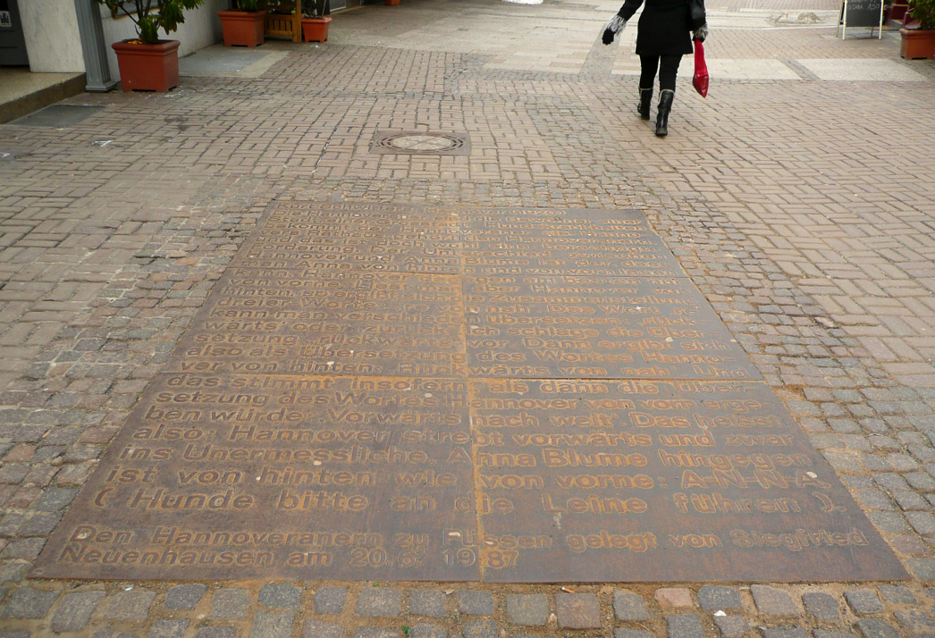 Eisenplatte mit Schwitters Gedicht in Hannover von Siegfried Neuenhausen